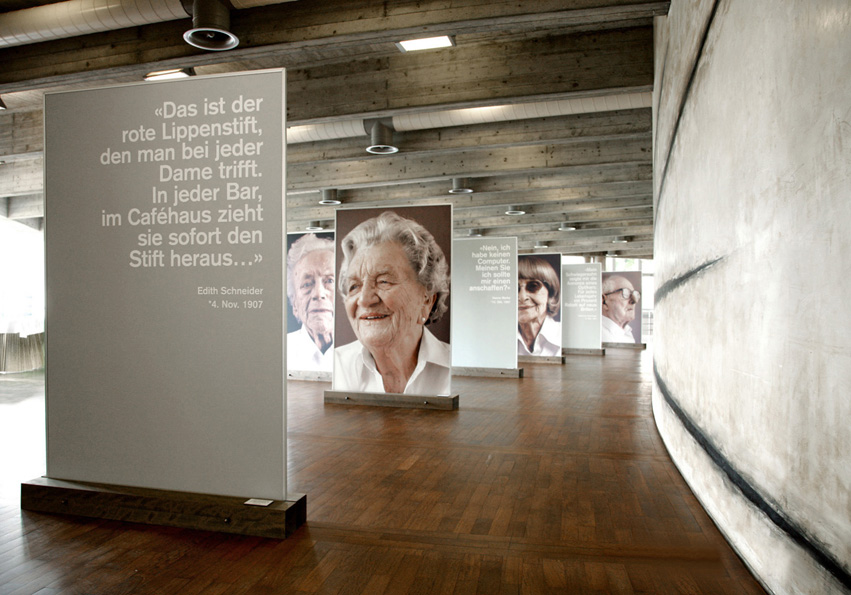 WDA Kongress, St. Gallen 2008